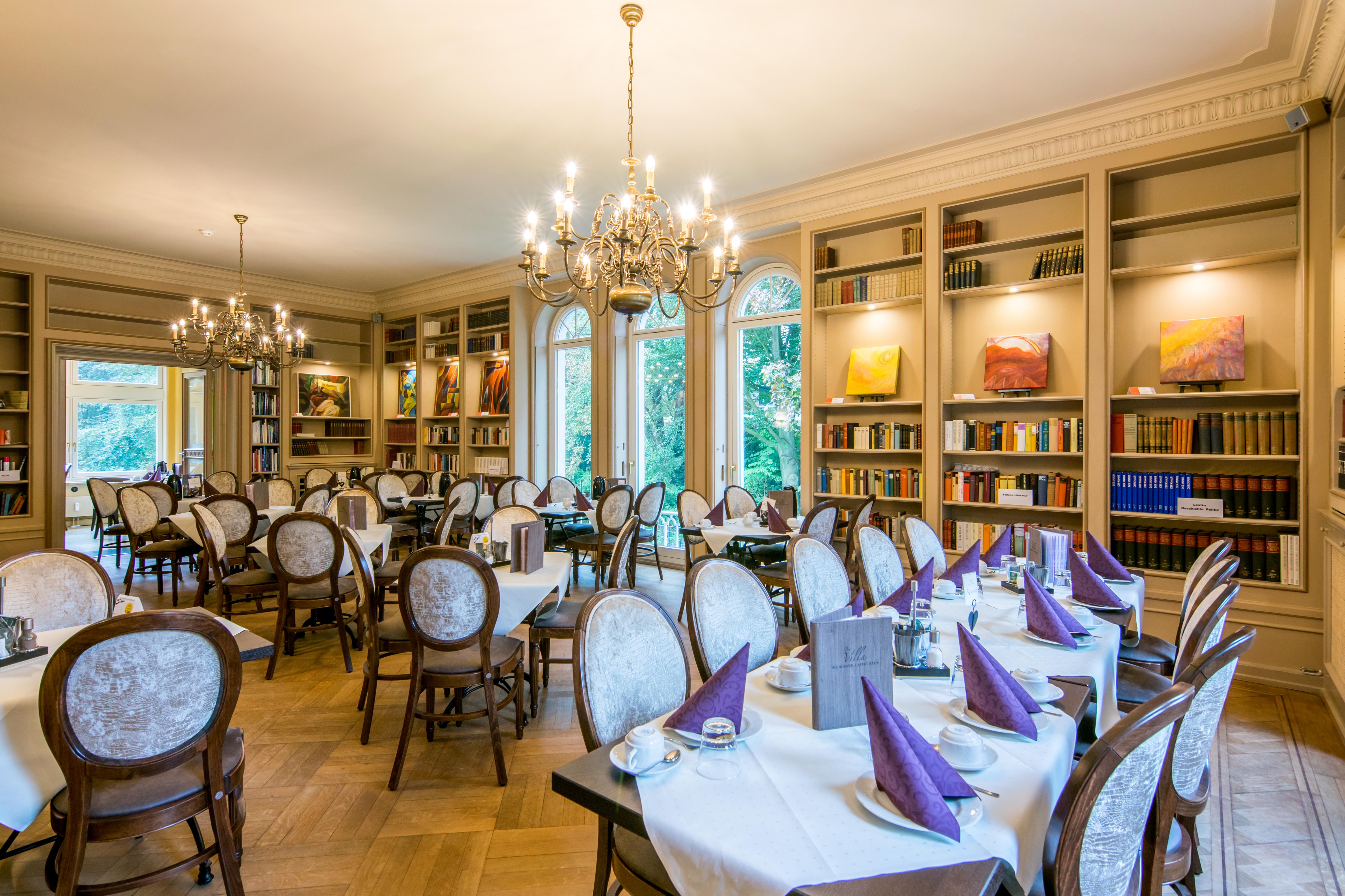 HH-Volksdorf Ohlendorffsche Villa Bibliothek